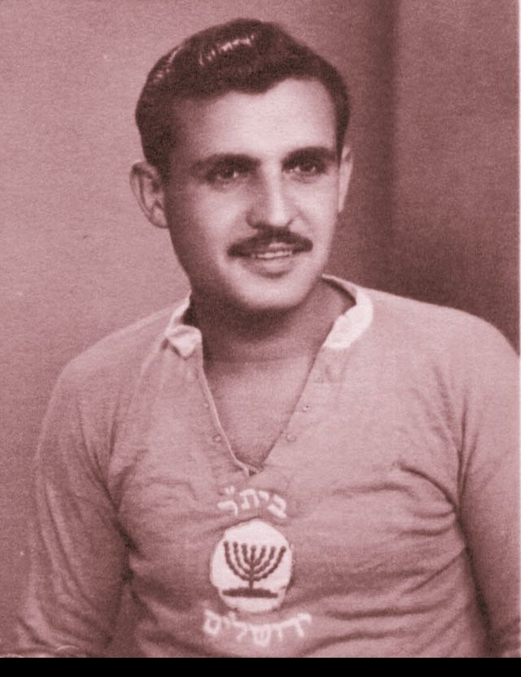 ציון שלום בתקופתו כשחקן בית״ר ירושלים